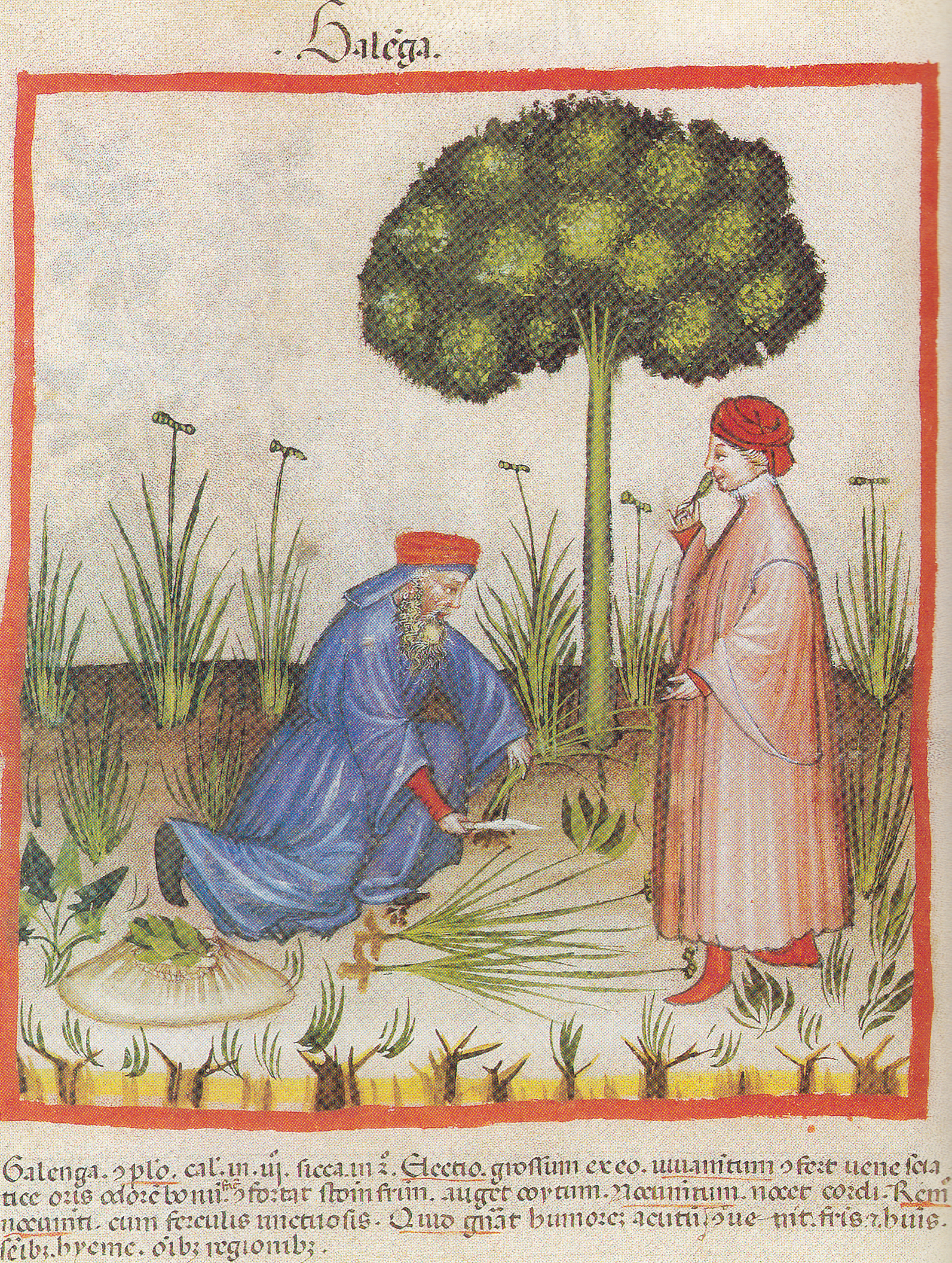 Alpinia officinarum. Abbildung uns Text im Taciunum sanitatis in medicina. Cod. Vind. Ser. Nova 2644, Blatt 32v, 13. Jahrhundert